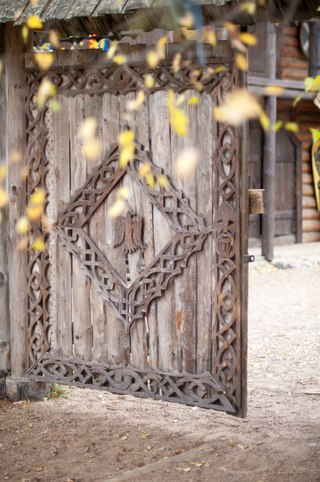 Средневековый город Сваргас